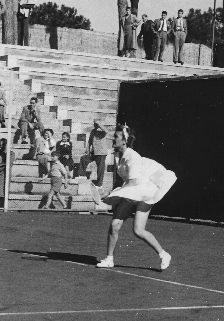 Vincitrice degli Internazionali di Roma del 1950